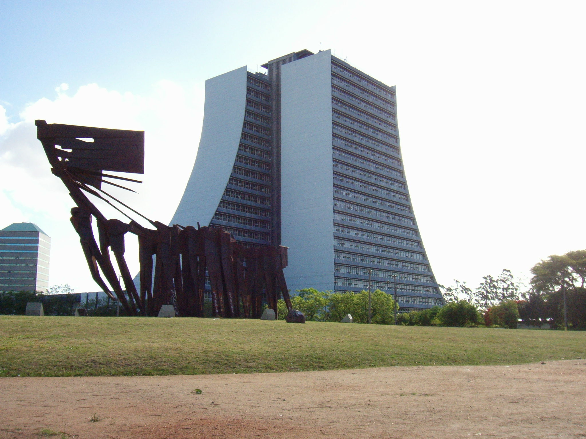 Centro administrativo do Estado do Rio Grande do Sul - Porto Alegre RS Brazil (con Monumento aos Açorianos (1974))